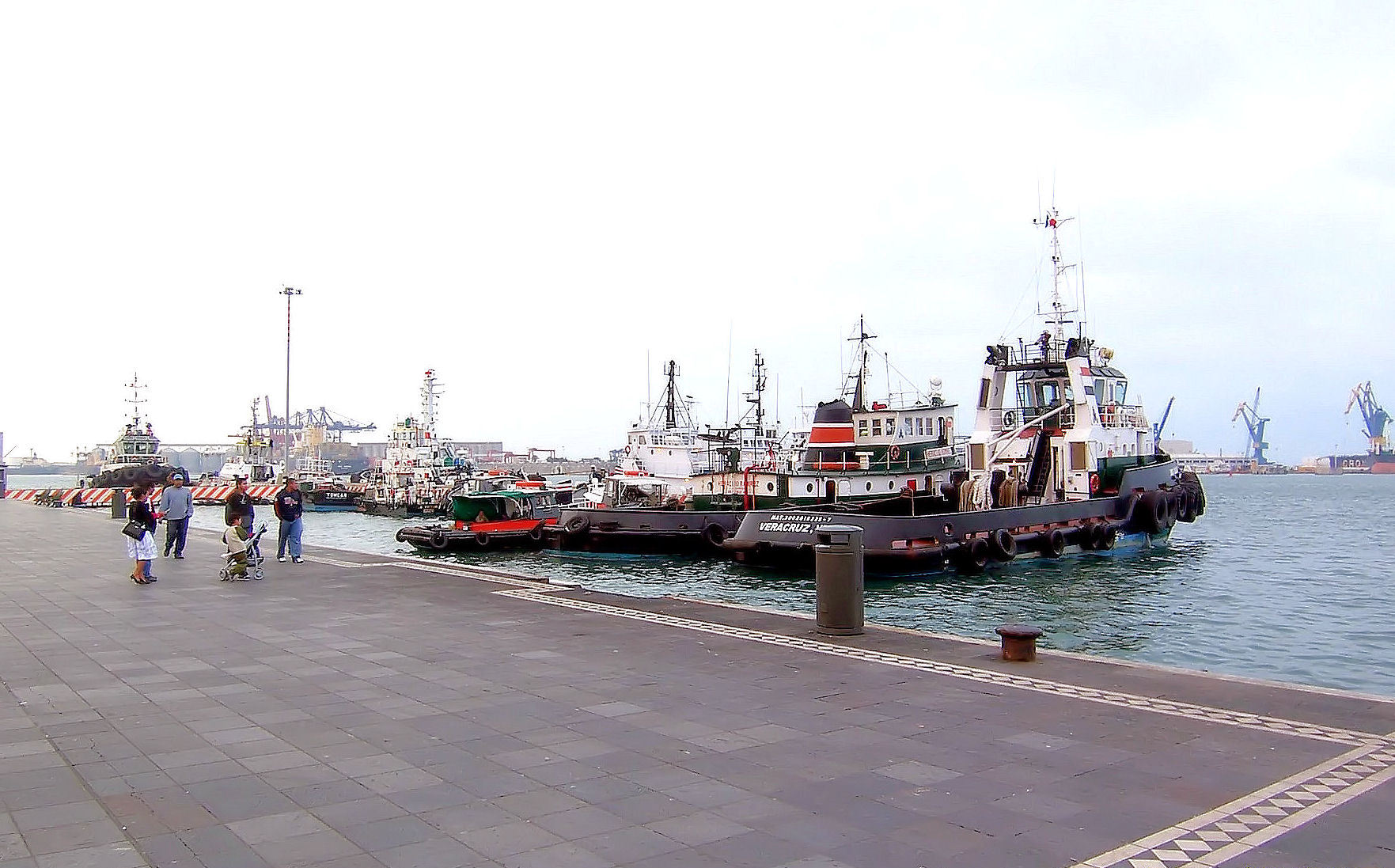 Paseo del Malecon